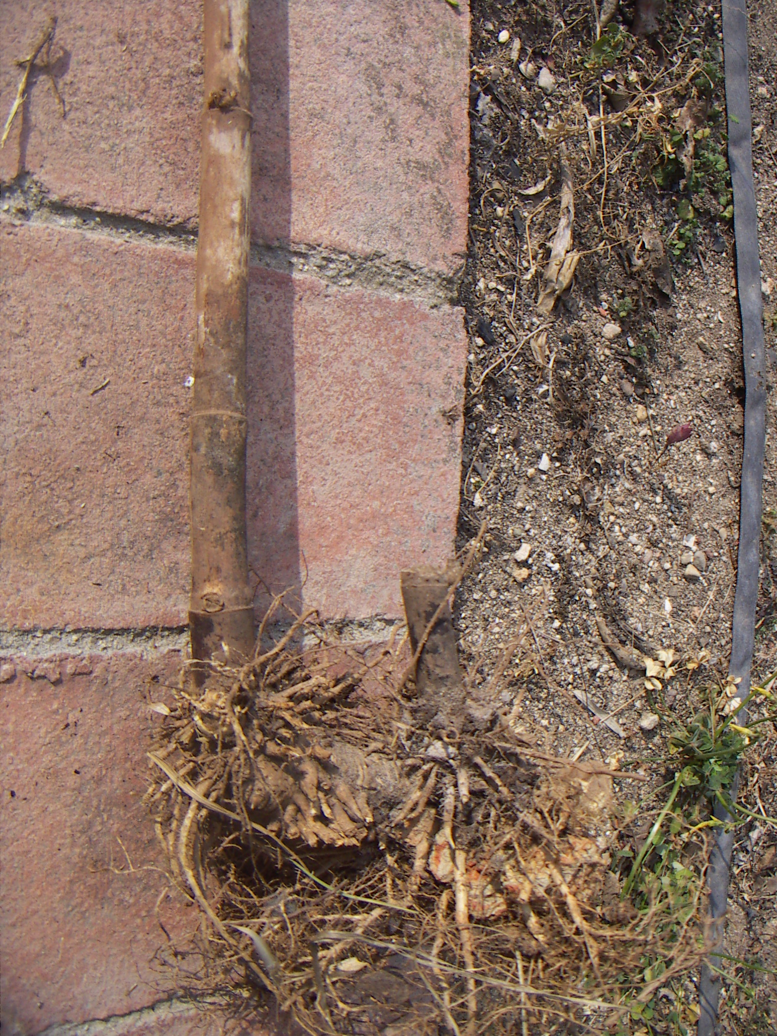 Rizoma de Bambusa oldhamii Soc l'autor